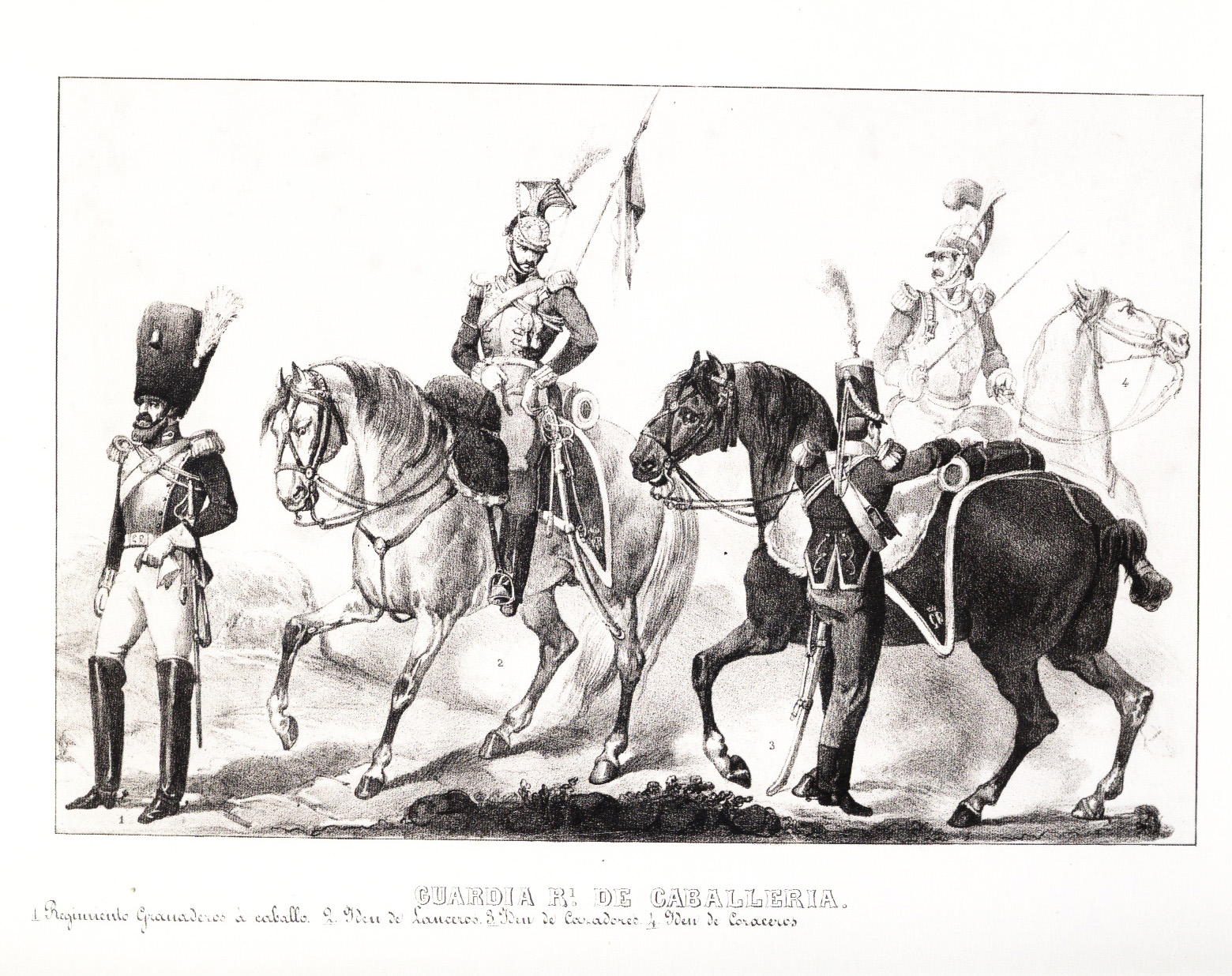 Guardia Real de Caballería. "Albúm de las Tropas Carlistas del Norte". Madrid, sin fecha. (184?)